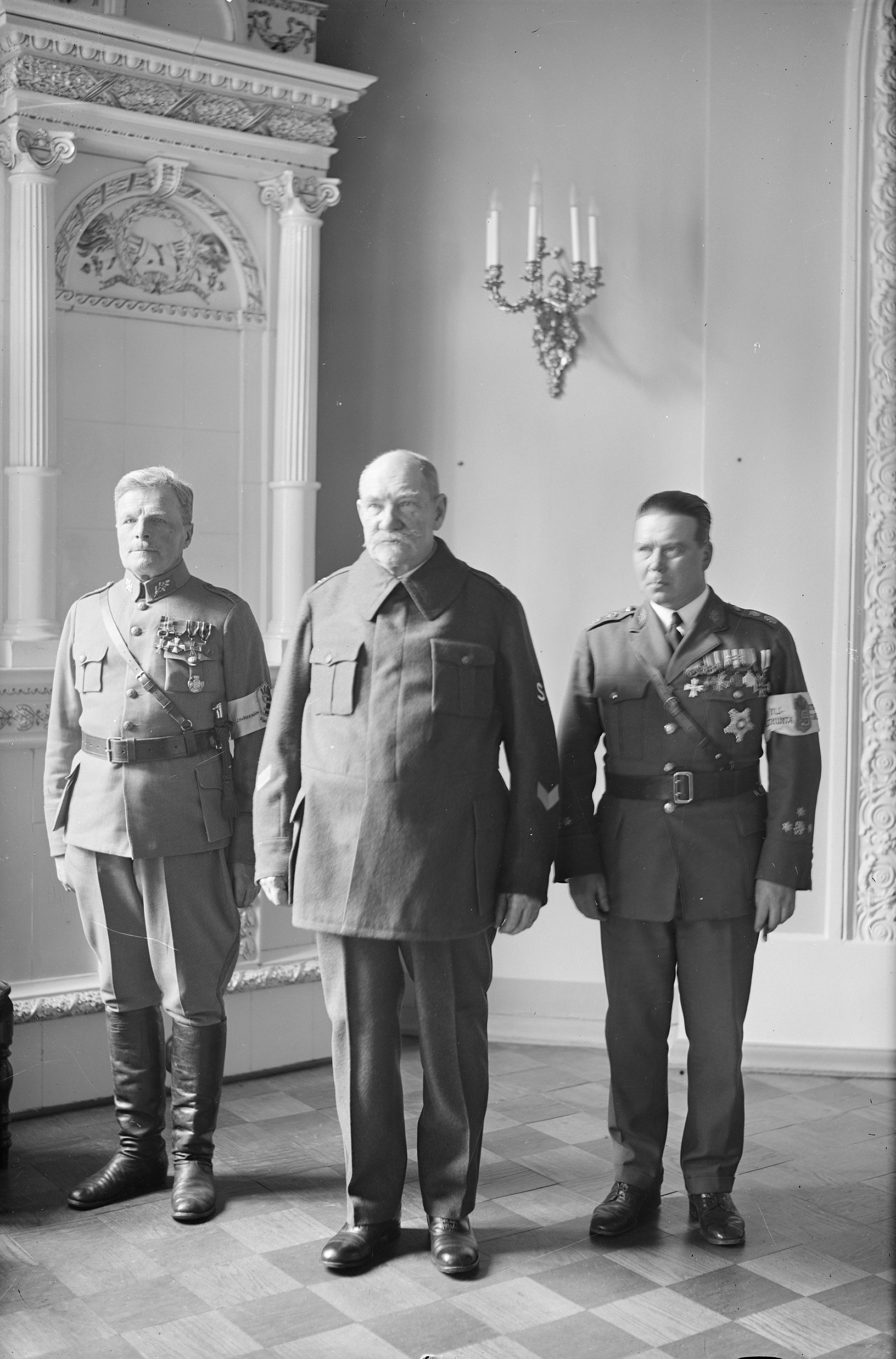 Suojeluskuntain päällikkö, kenraalimajuri Lauri Malmberg ja Suojeluskuntain piiriesikunnan lääkäri Oskari Heikinheimo Tasavallan presidentti P. E. Svinhufvudin luona Presidentinlinnassa Suojeluskuntain vuosikokouksen merkeissä.